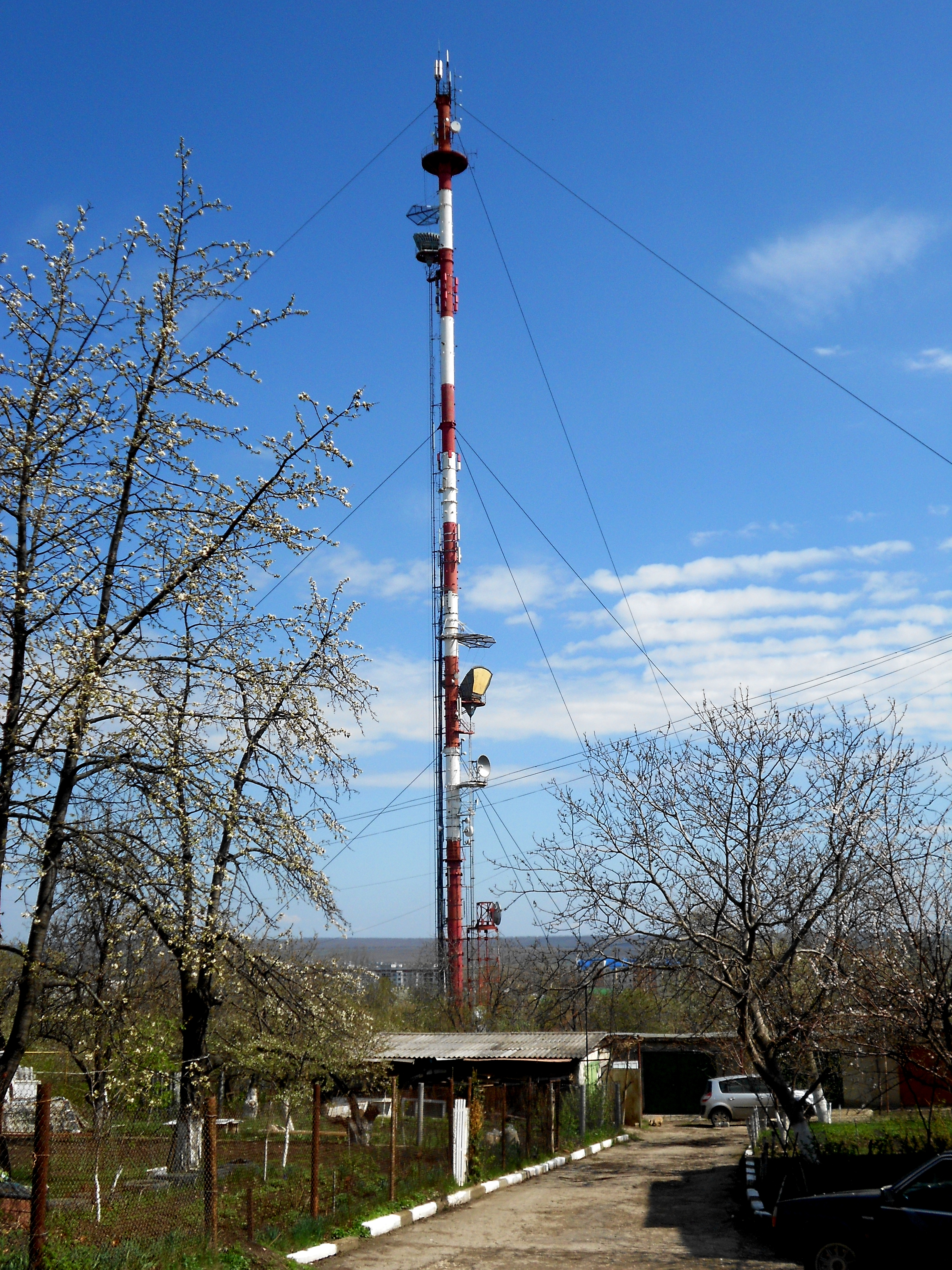 Bălți